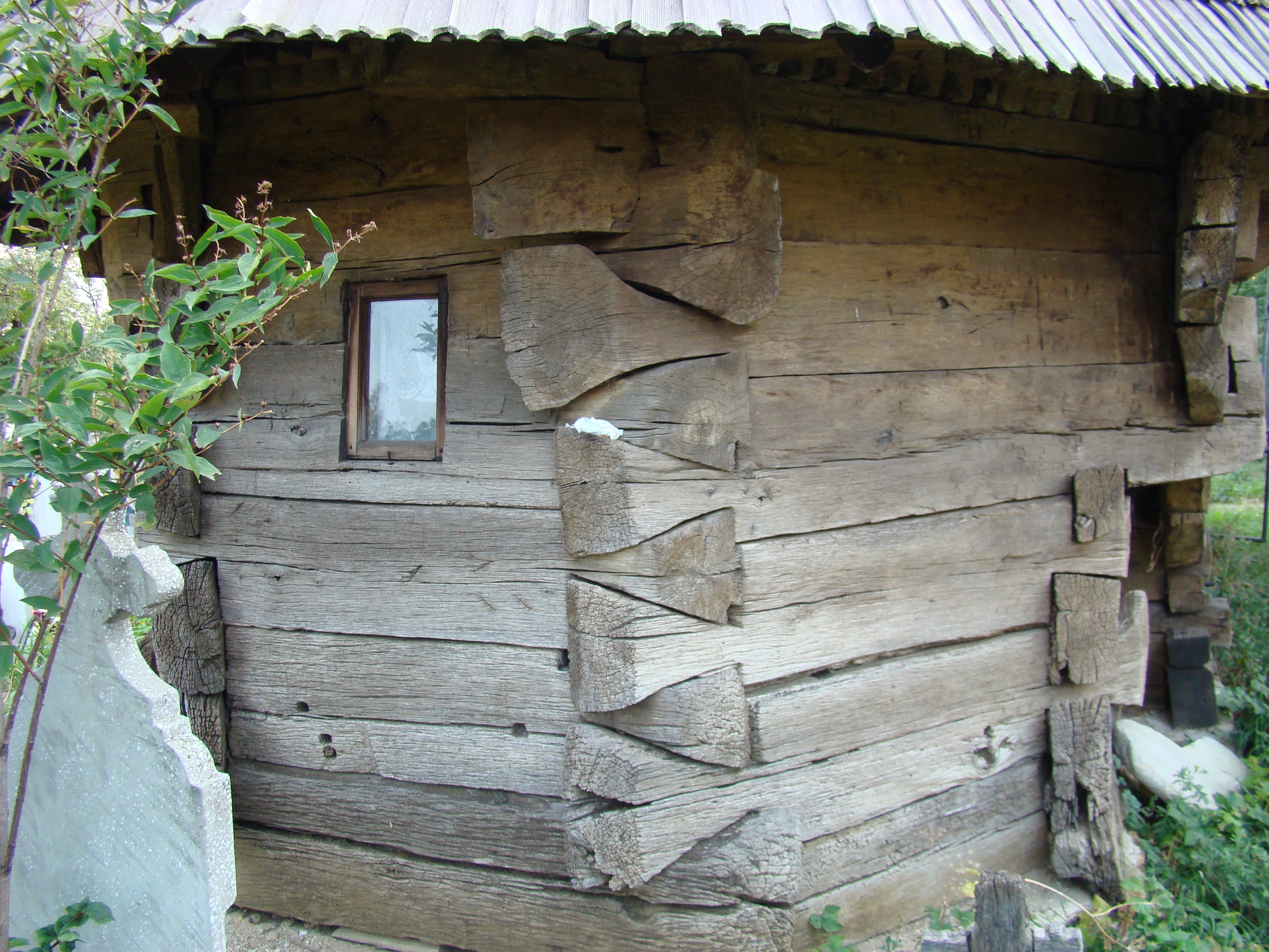 Biserica de lemn „Intrarea în Biserică” din Stâncești-Larga, Gorj